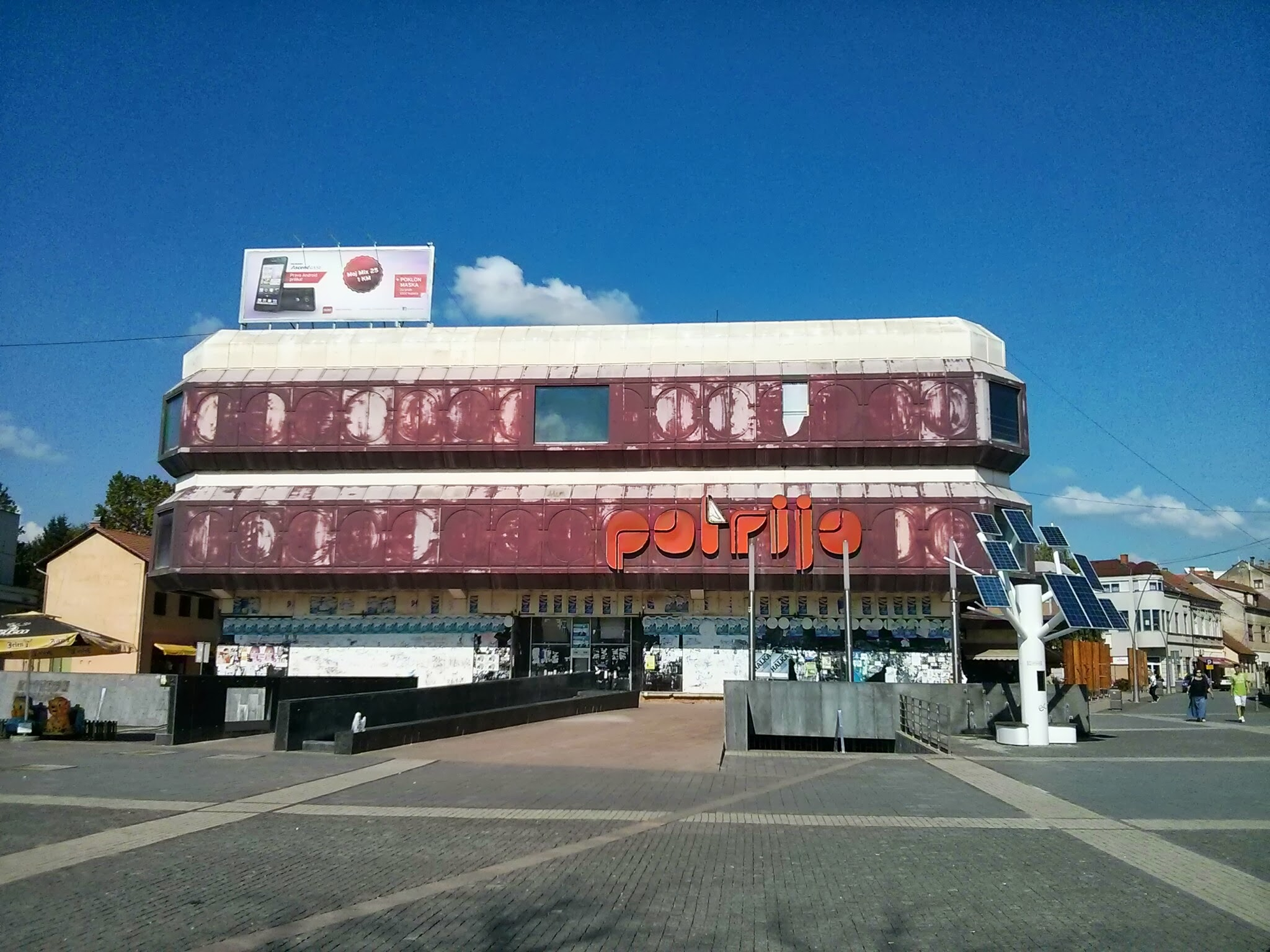 Patrija mall, Prijedor